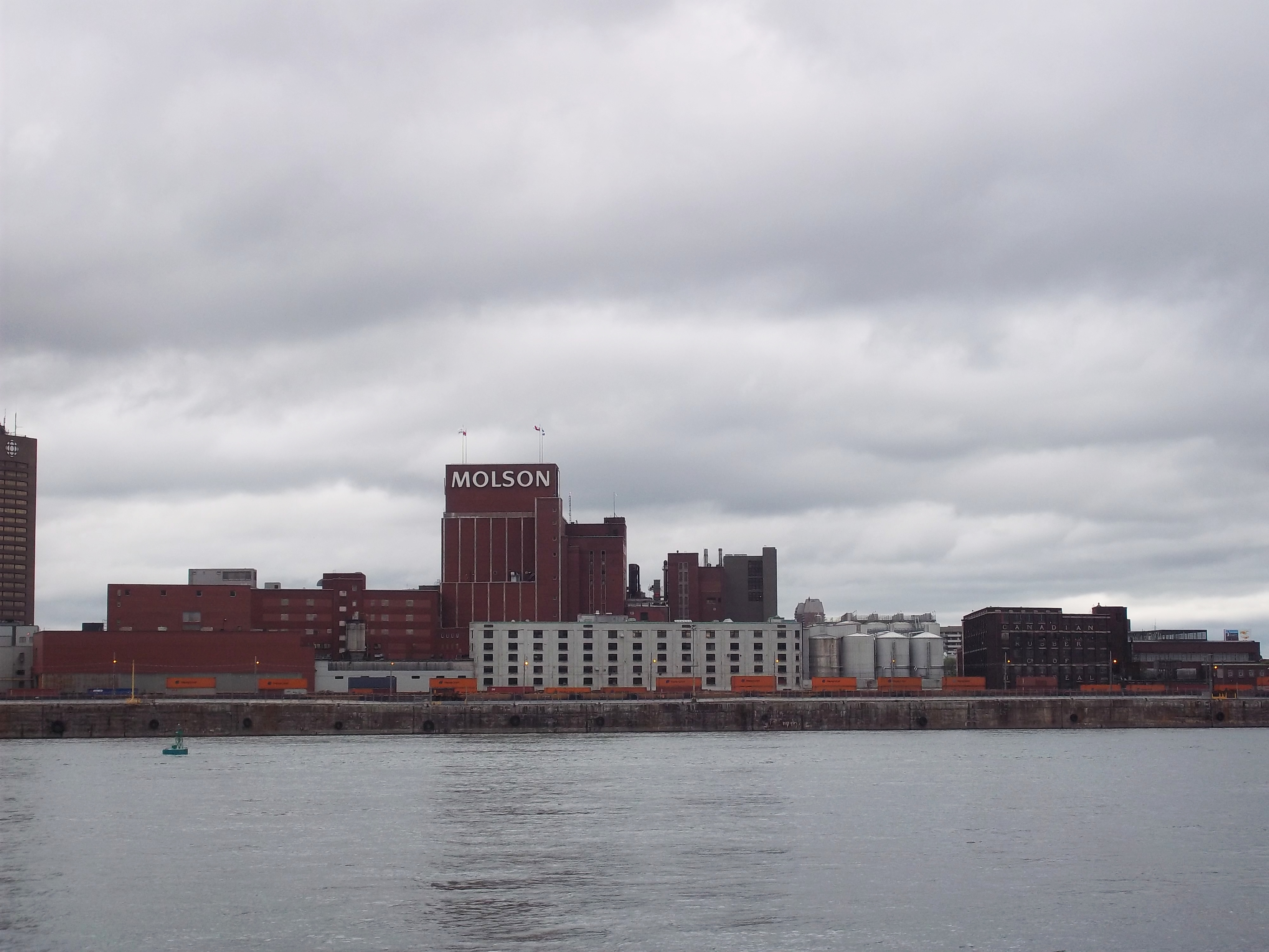 Brasserie Molson, Montréal, vue de l'île Sainte-Hélène